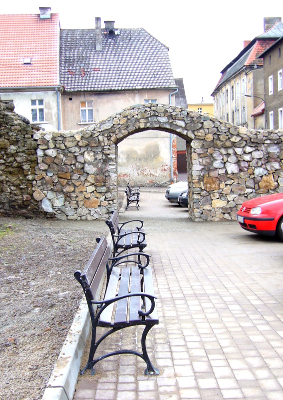 Kamienna Góra, mury miejskie, XV